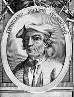 Grabado que muestra al escultor florentino Pietro Torrigiano